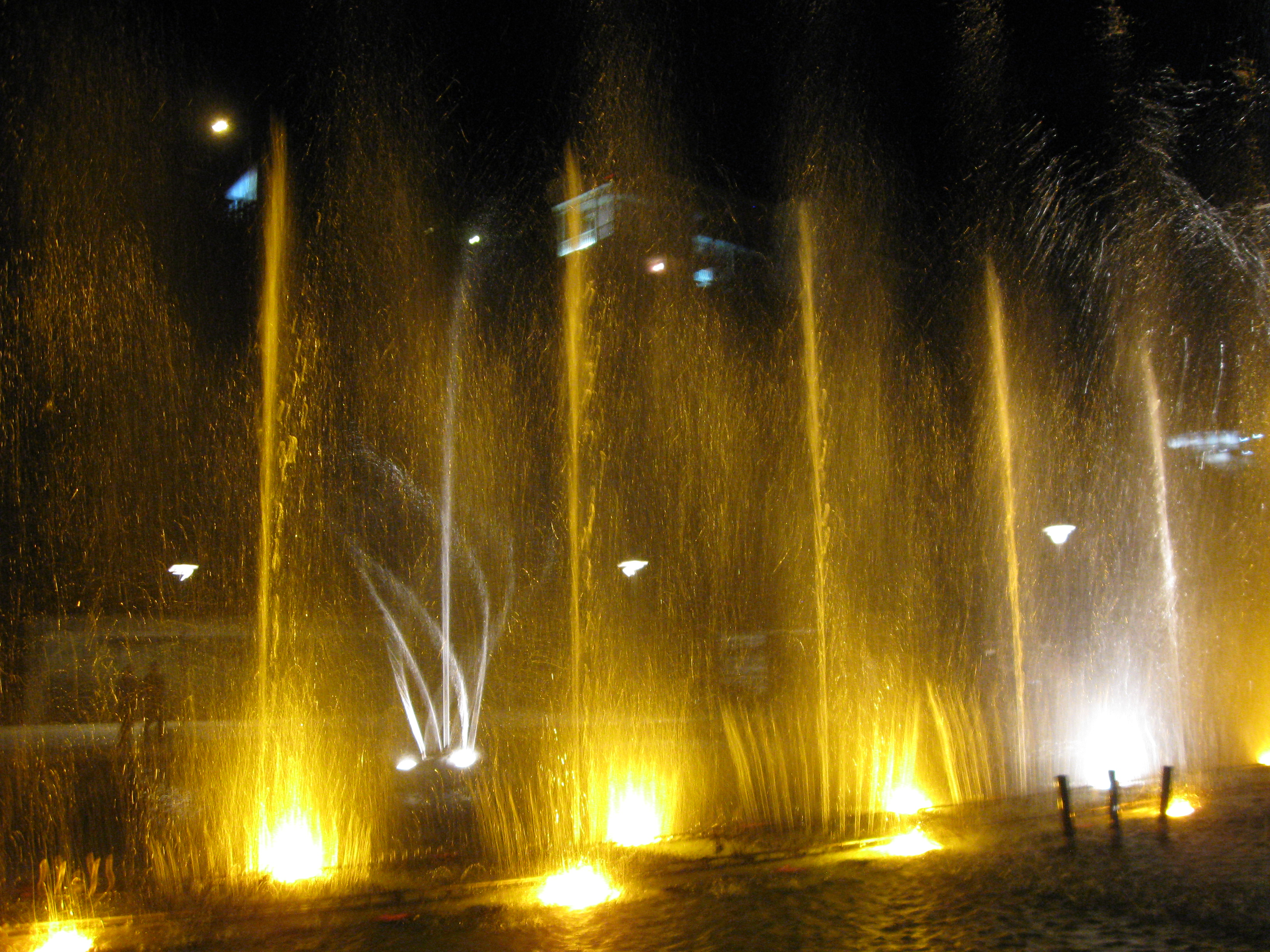 The fountain is located close to the Bridge of Peace